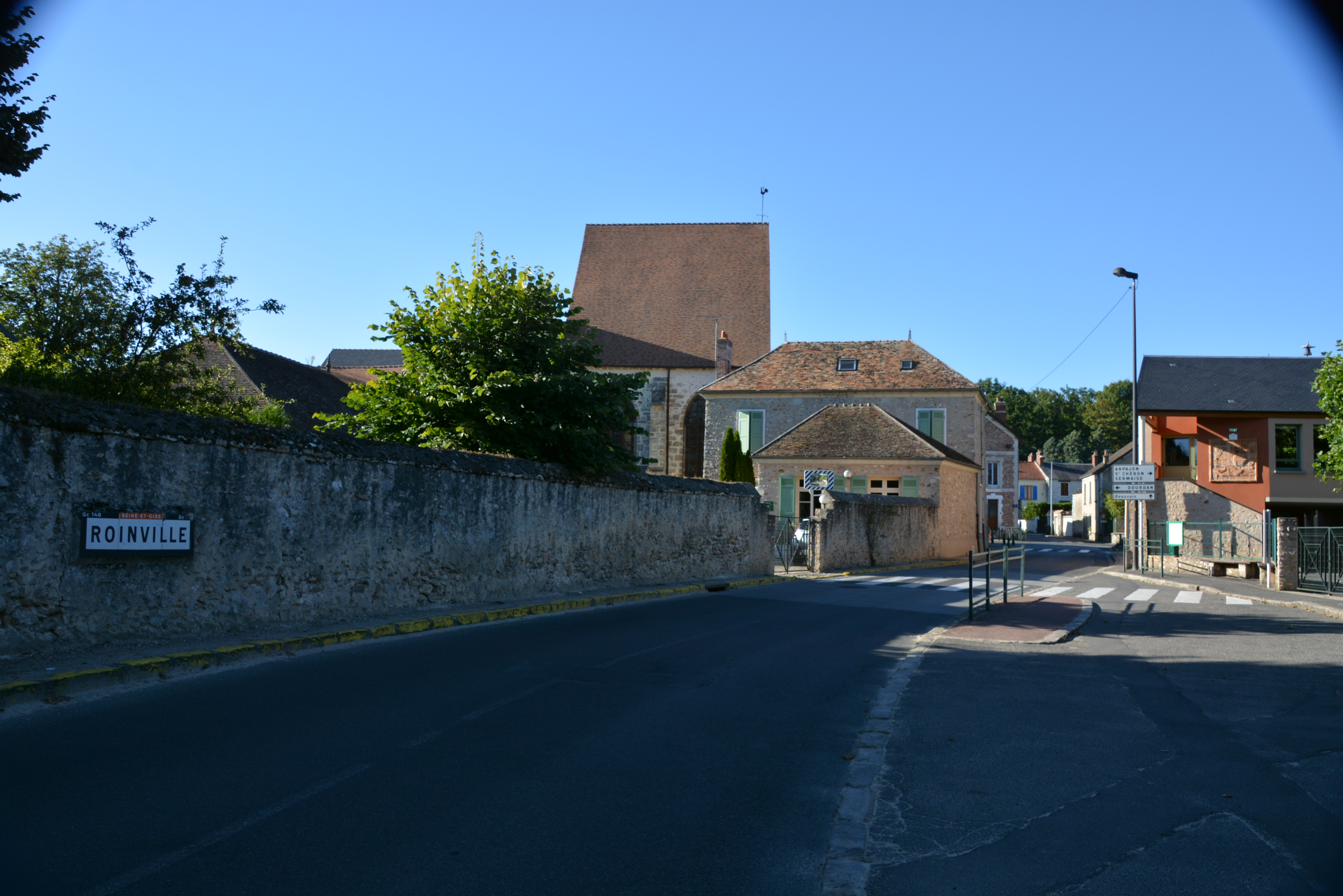 Entrée du bourg par la RD148